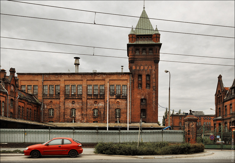 Уроцлаўскія замалёўкі